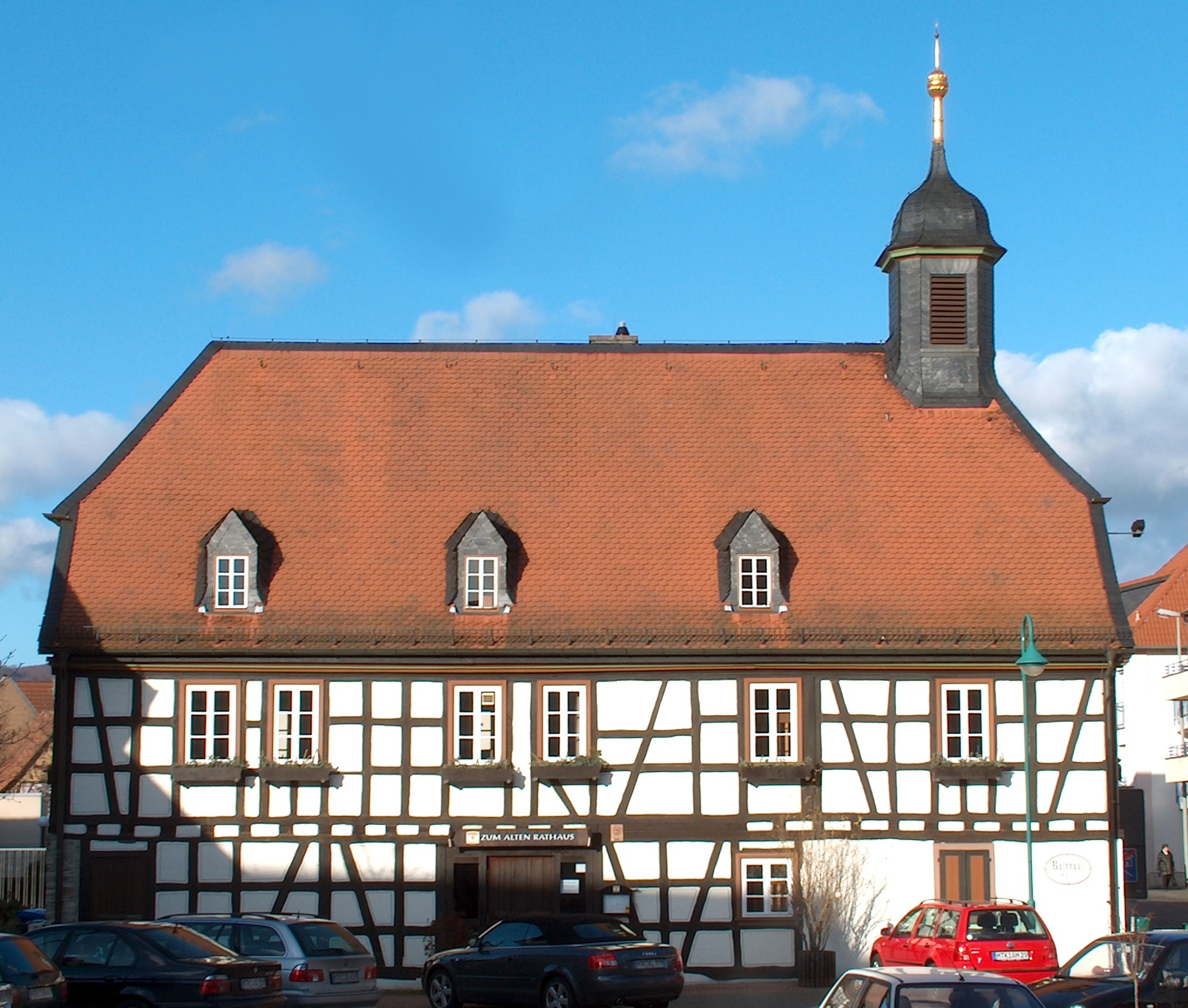 en.: formal city hall at Kelkheim-Münster; dt.: Altes Rathaus in Kelkheim-Münster